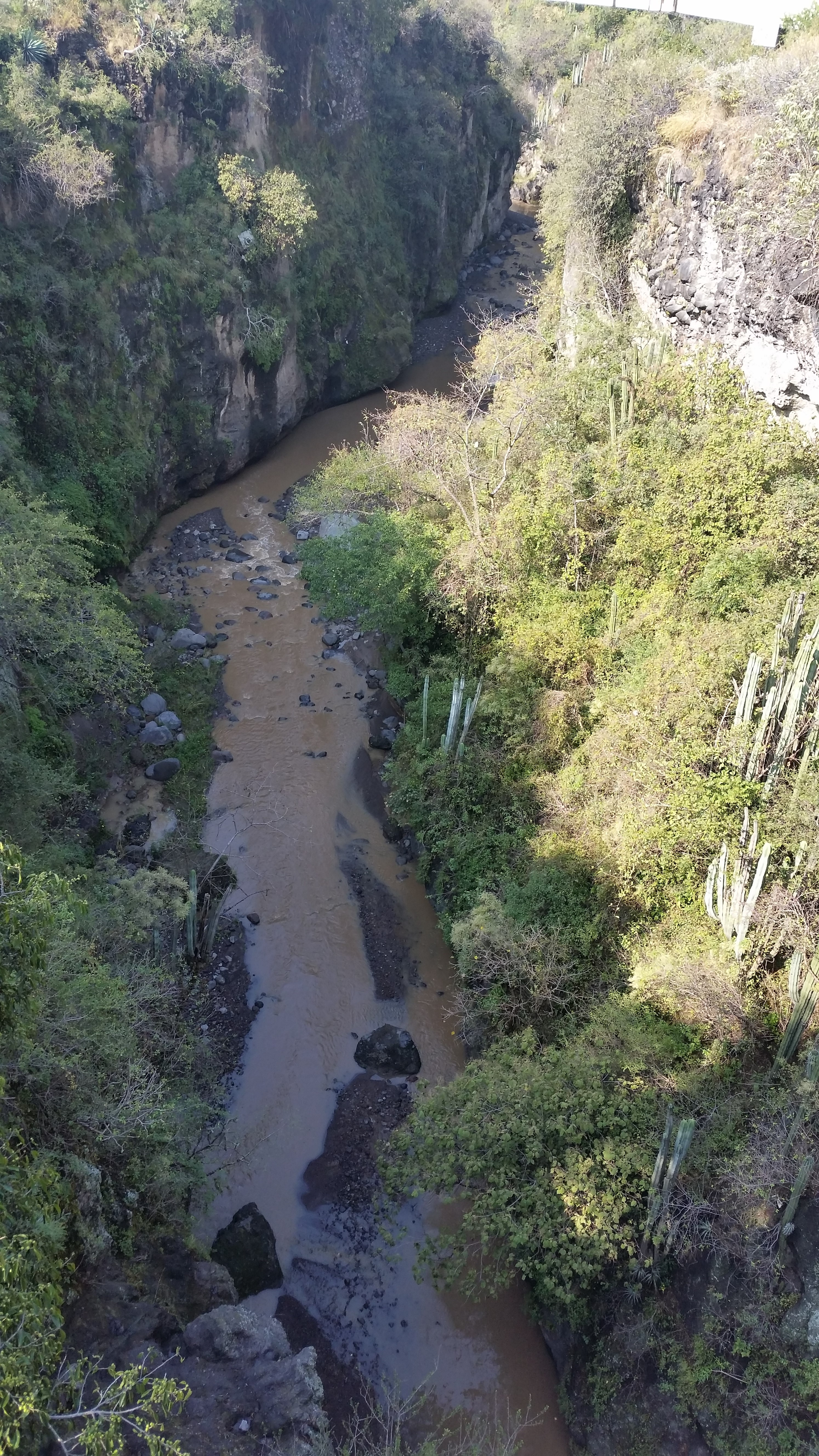 Barranca ubicada en la parte poniente del municipio de Temoac.